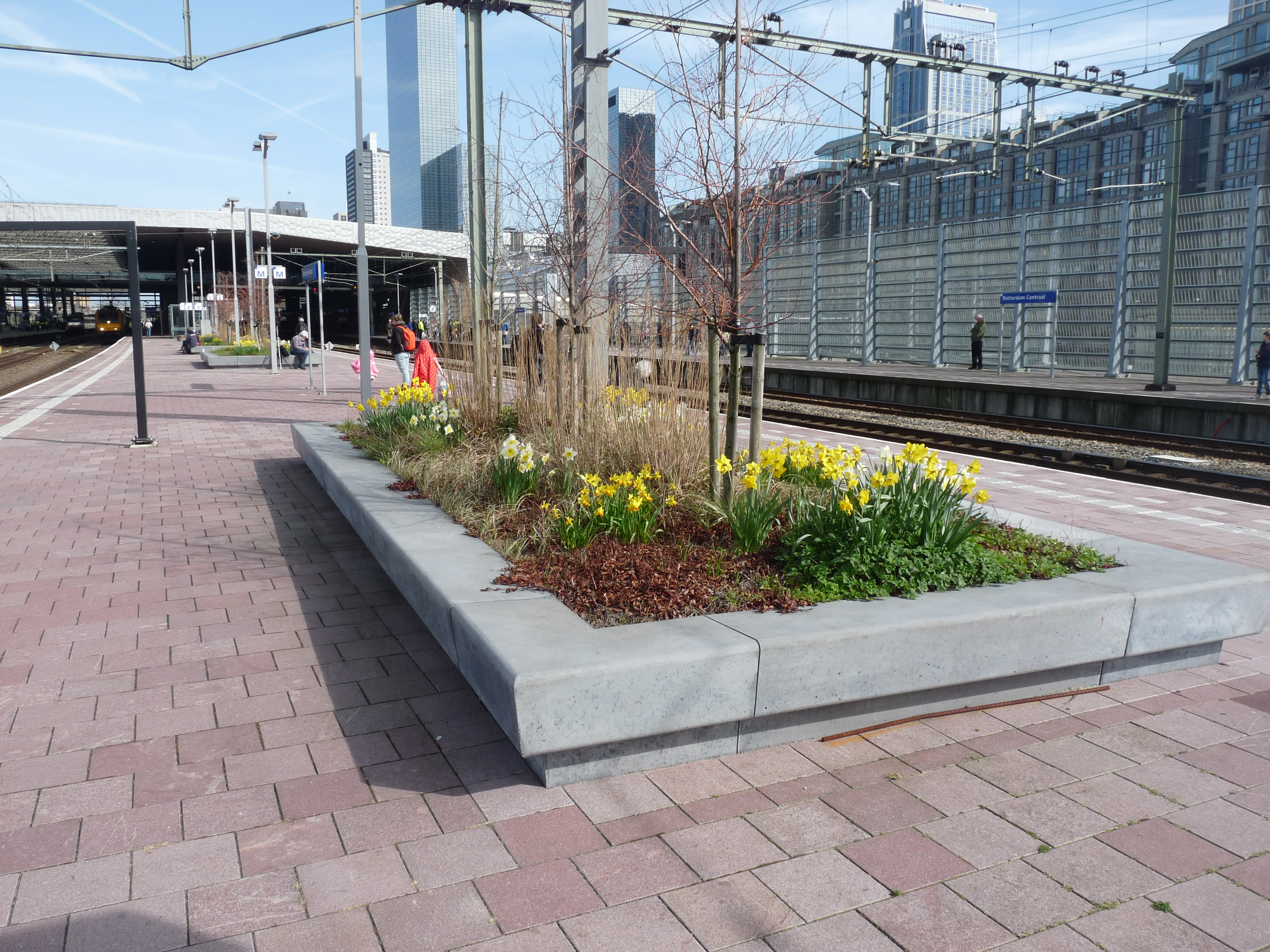 Bloembak op een perron van station Rotterdam Centraal.